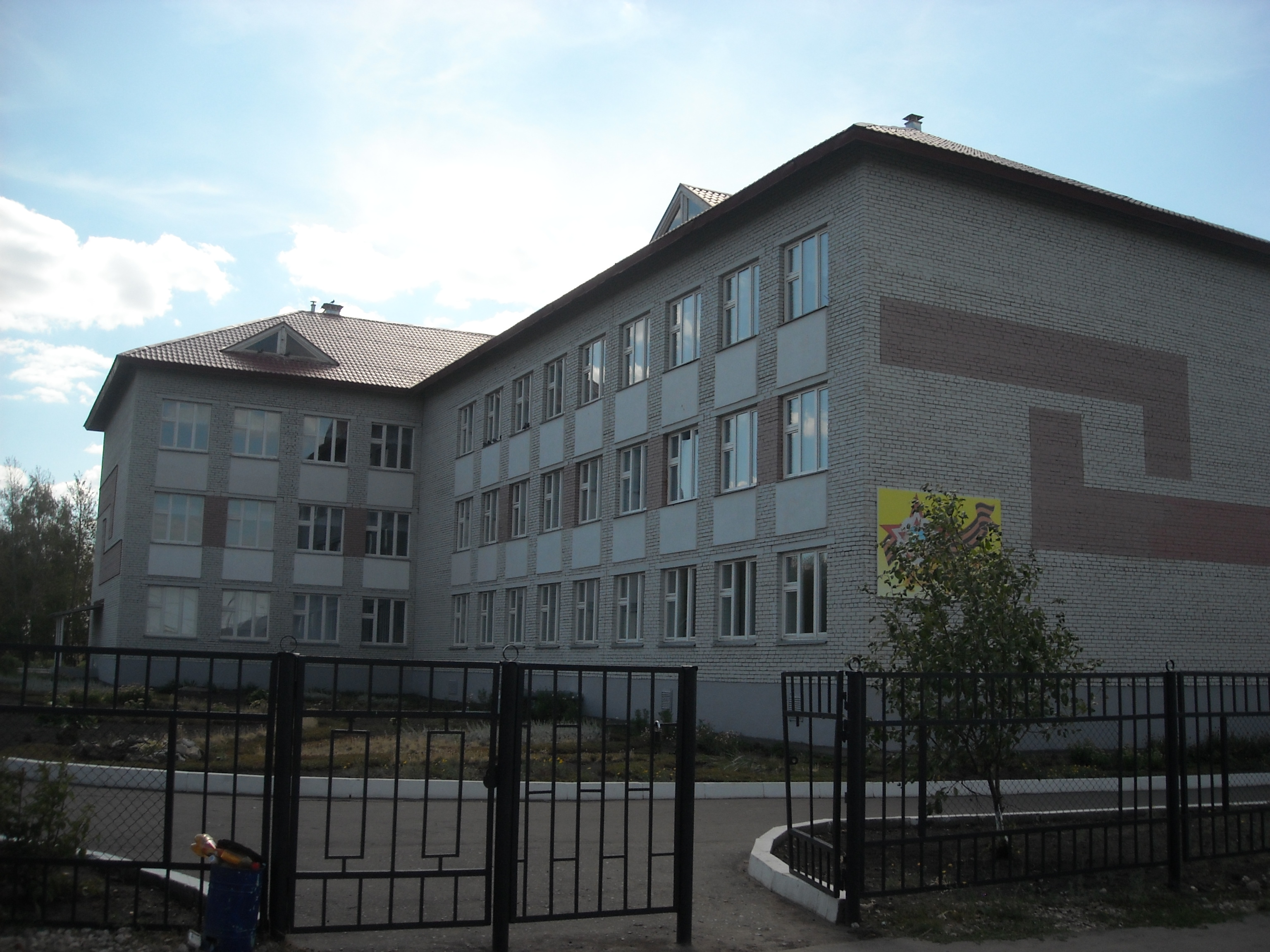 Школа находиться на улице 2 - ая разведка. Здание школы было построено в 2006 году.